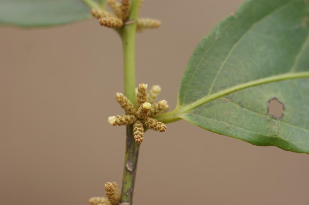 Lacistema hasslerianum Chodat - LACISTEMATACEAE - Jardim Botânico de Brasília - Distrito Federal - Brasil.